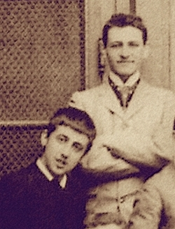 Marcel Proust et Raoul Versini, détail d'une photo de classe du lycée Condorcet, 1888. Photographe Pierre Petit.